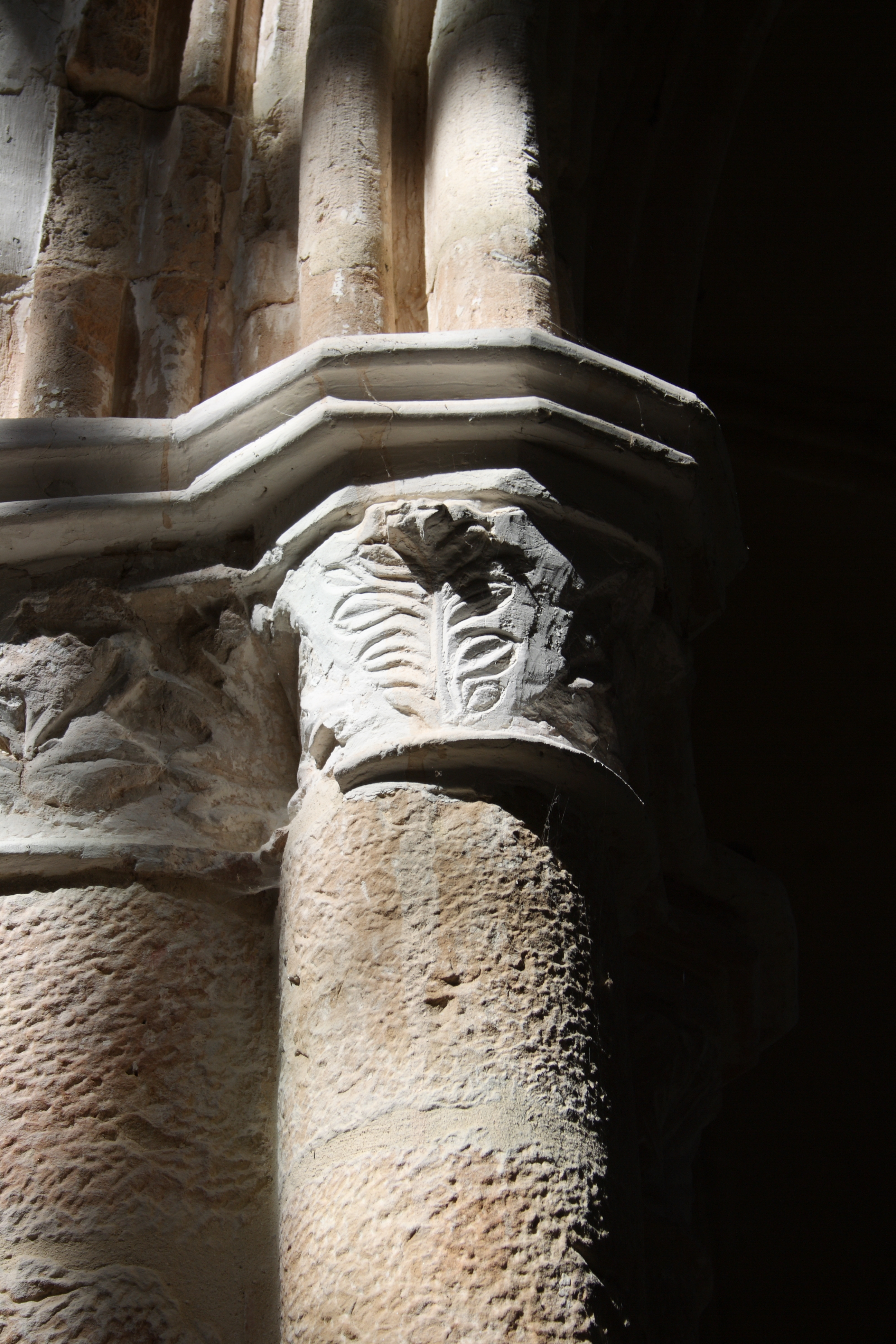 Katholische Pfarrkirche Saint-Eliphe in Rampillon, einer Gemeinde im Département Seine-et-Marne (Île-de-France), Kapitelle im Langhaus